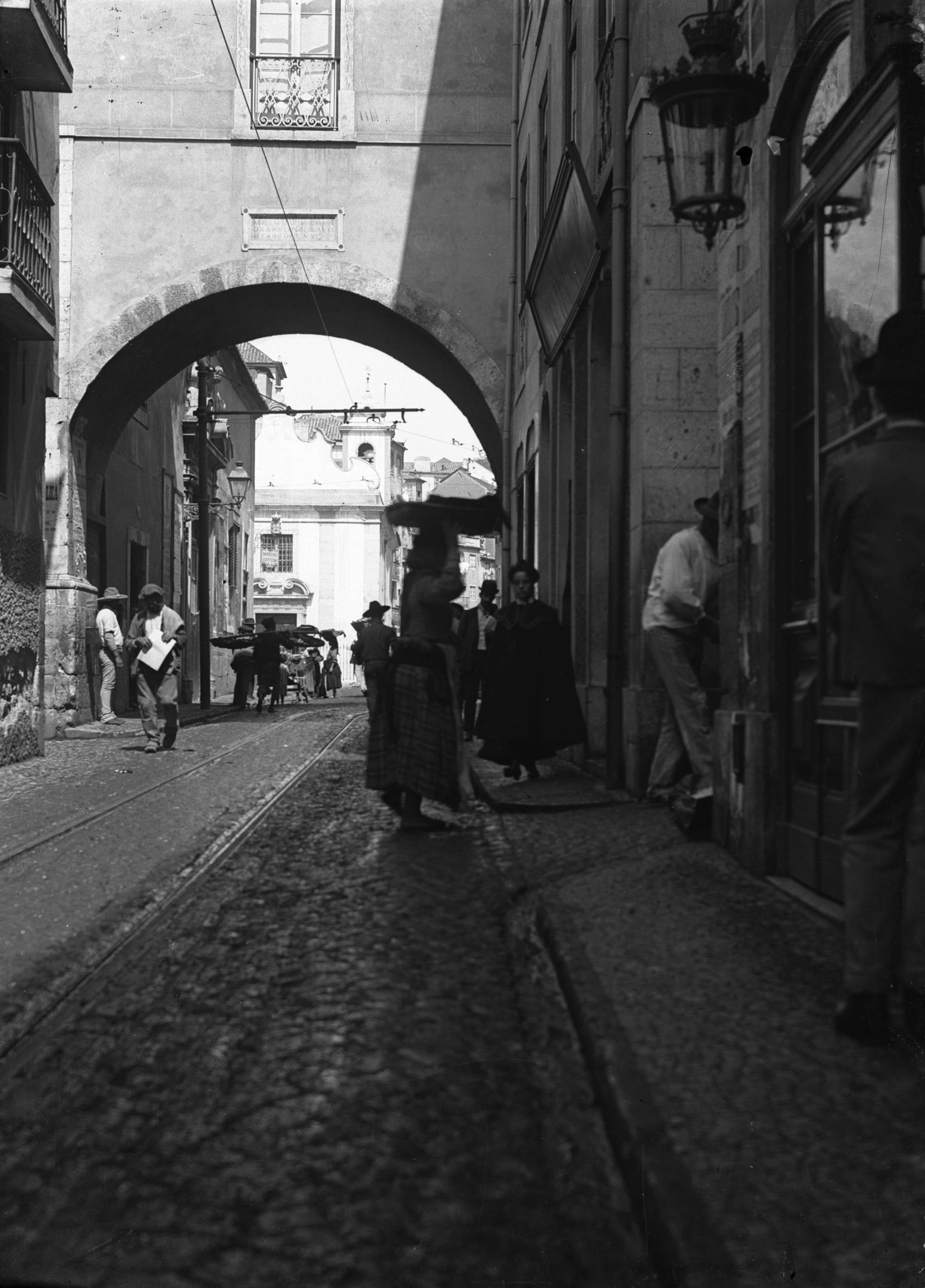 Título: Arco do Marquês de Alegrete Dimensão: 9 x 12 cm Suporte: Negativo de gelatina e prata em vidro Notas: Inscrição no original: 6397 Assunto: Venda ambulante de peixe / Vestuário / Ermida de Nossa Senhora da Saúde / Varina / Arco do Marquês do Alegrete (rua, Santa Maria Maior, Lisboa, Portugal) / Marquês de Alegrete (arco, Santa Maria Maior, Lisboa, Portugal) Código de referência: PT/AMLSB/BAR/000262